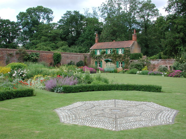 Hoveton Hall Gardens